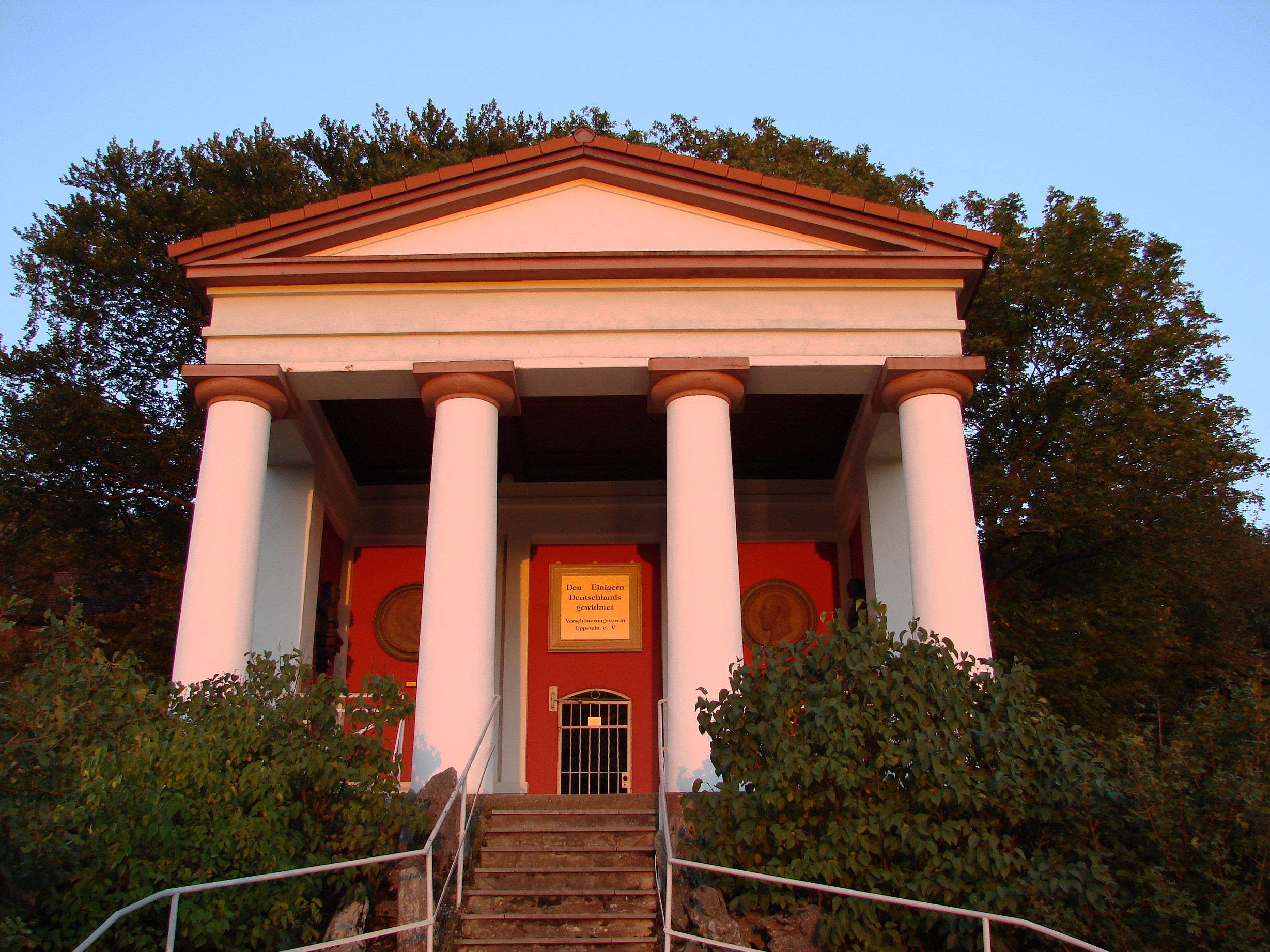 Eppstein, Germany, Kaisertempel